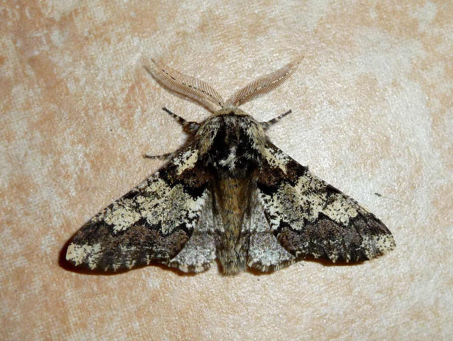 Oak Beauty. Biston strataria